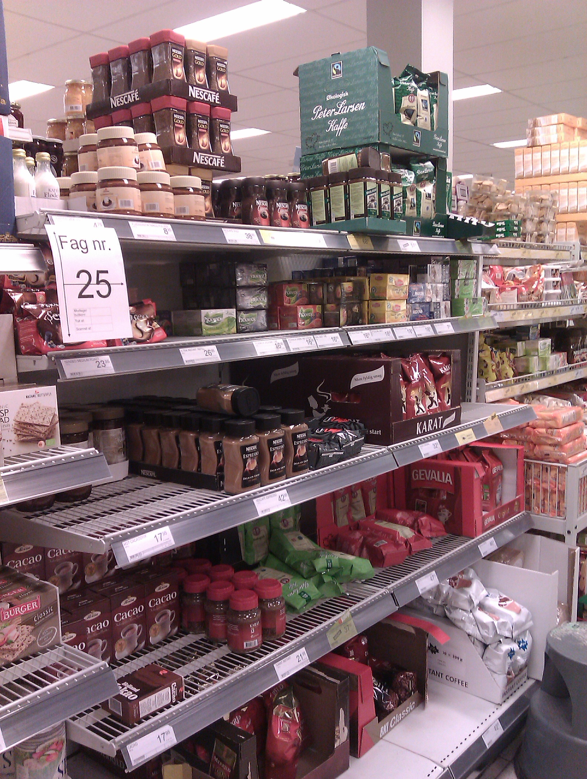 Når daglighandelen gør status, mærkes alle hyldefag